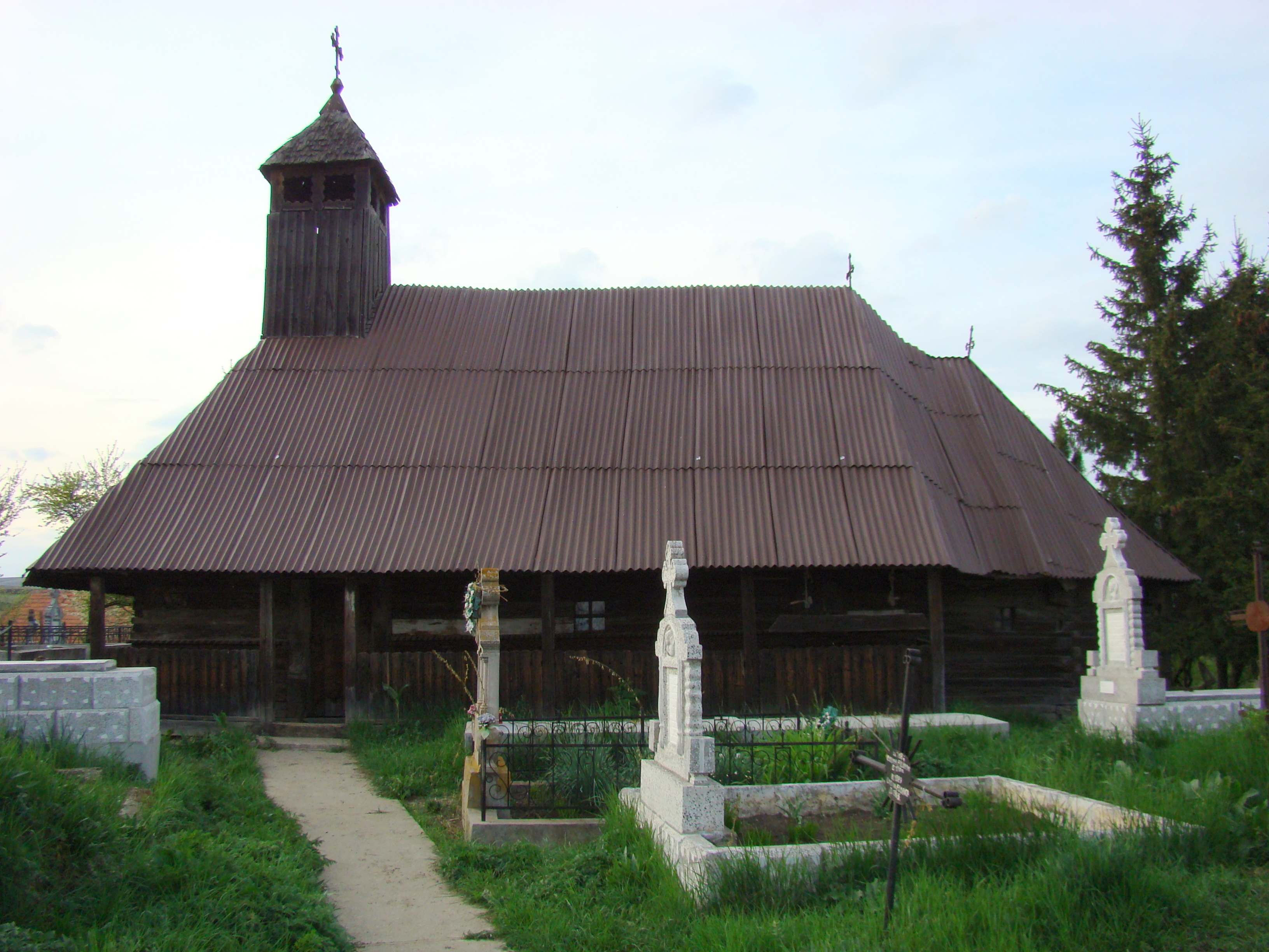 Biserica de lemn "Sf. Nicolae", sat Ghirbom; comuna Berghin